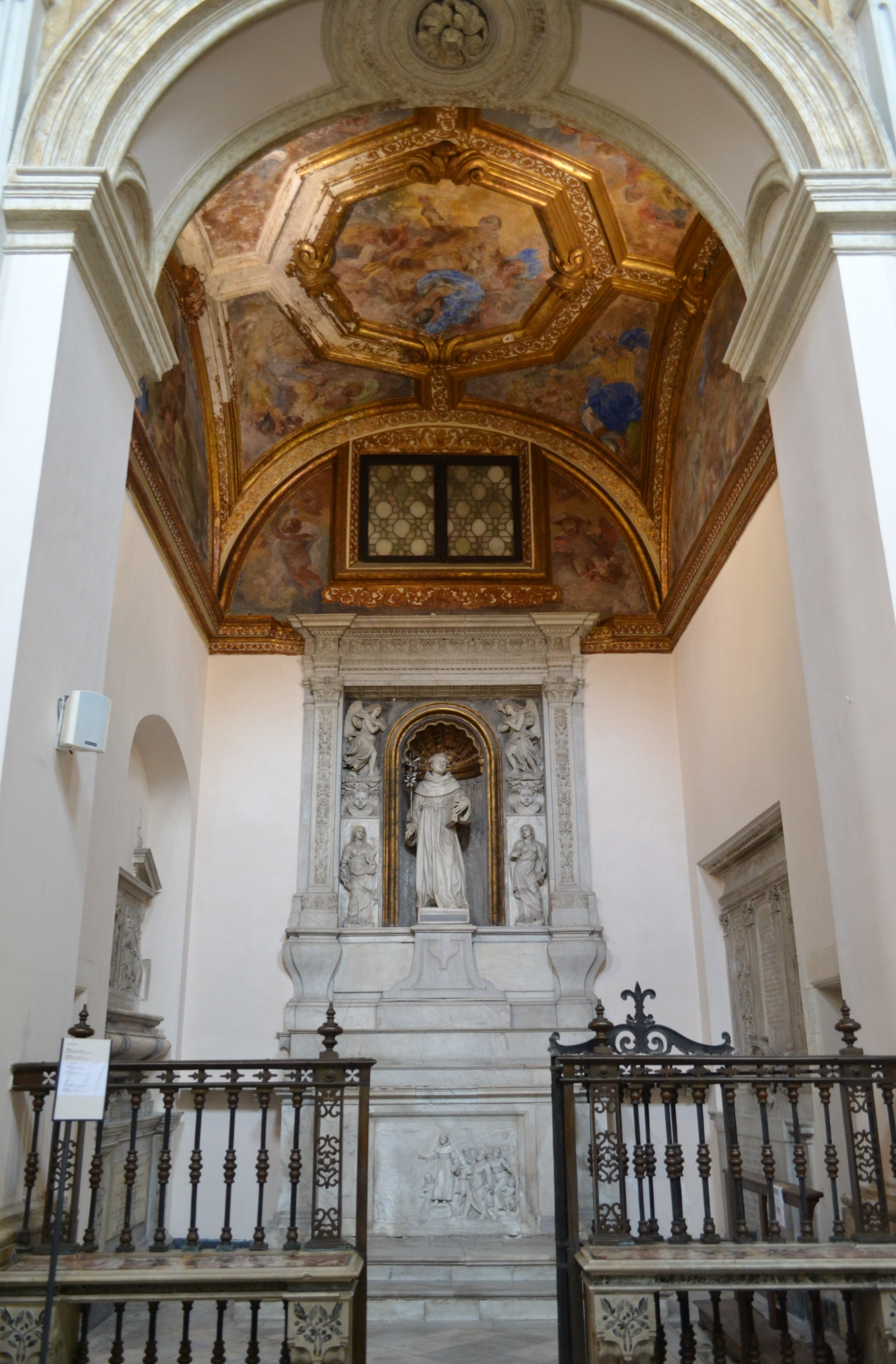 Cappella di Sant'Antonio da Padova - Chiesa di Sant'Anna dei Lombardi di Napoli